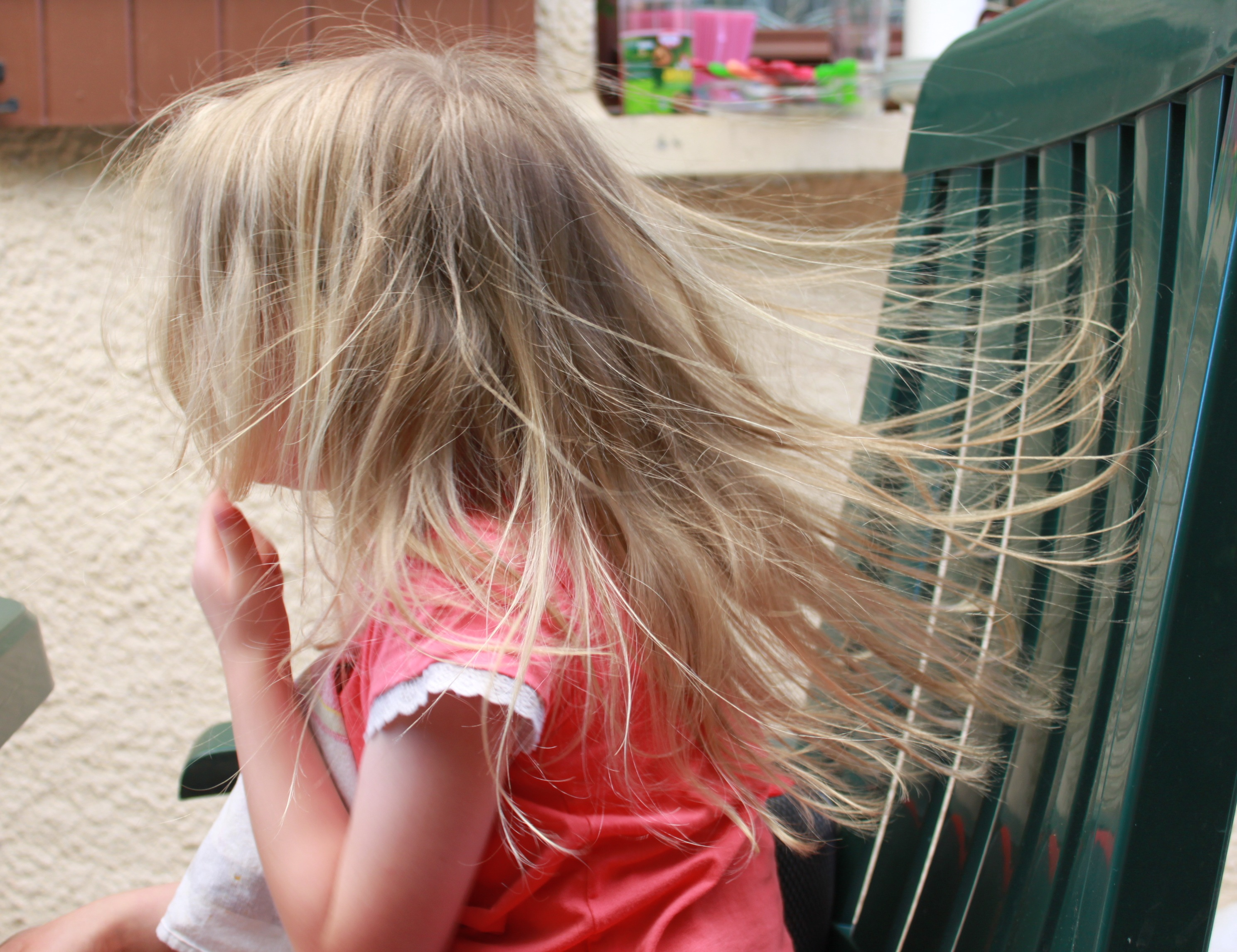 Illustration de l'électricité statique entre des cheveux et une chaise plastique